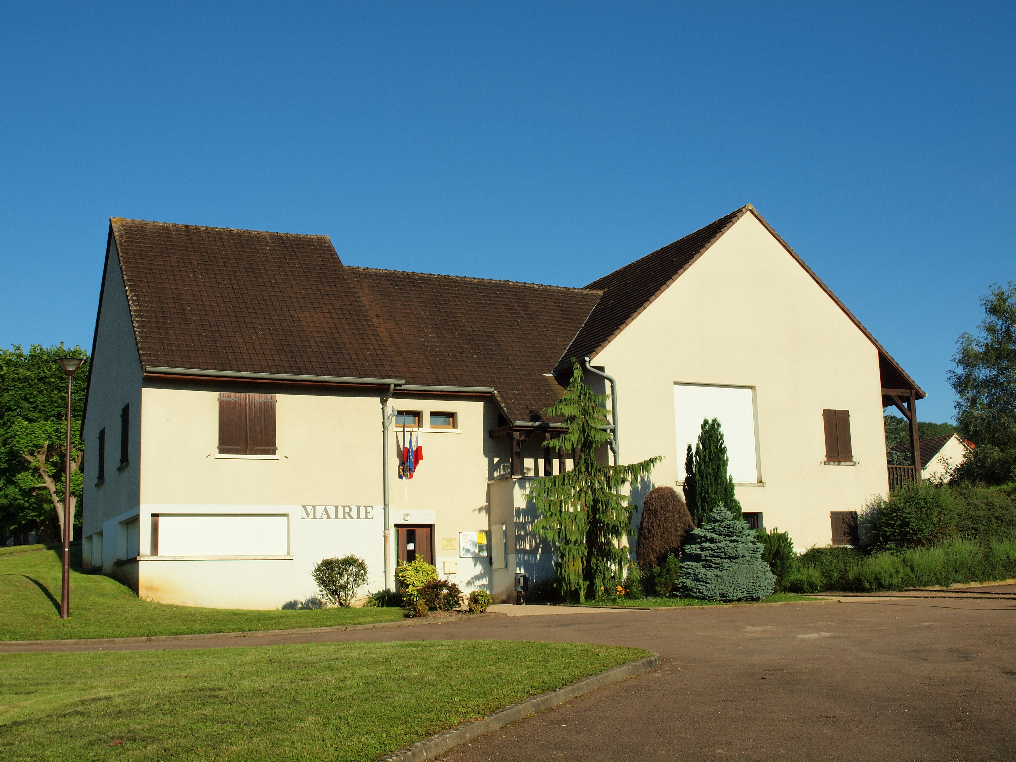 Looze (Yonne, France) ; mairie